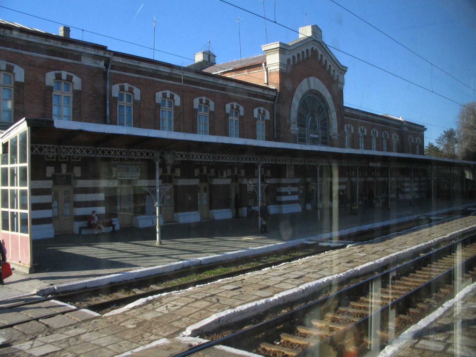 The Râmnicu Sărat, Buzău County, Romania train station